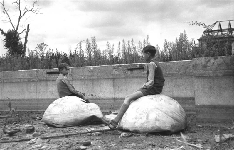 ADN-ZB/Donath Berlin 1947: Im Garten der ehemaligen Reichskanzlei die Überreste des Globusses, der einst in Hitlers Arbeitszimmer stand.